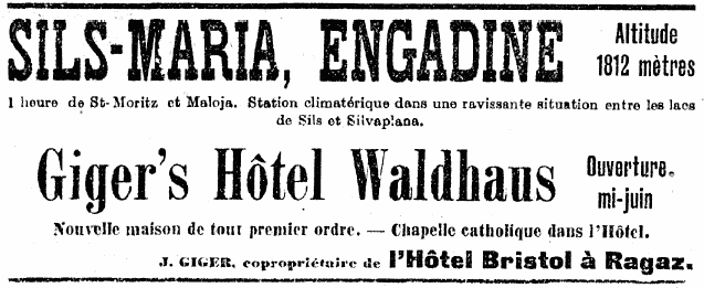 Annonce parue dans le Journal de Genève du 28 mai 1908, annonçant l'ouverture de l'Hôtel Waldhaus de Sils-Maria en Haute-Engadine (canton des Grisons, Suisse).